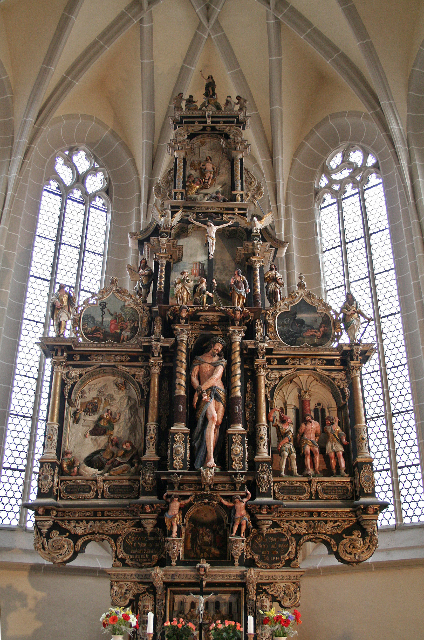 Leisnig, Kirche St. Matthäi, Altar